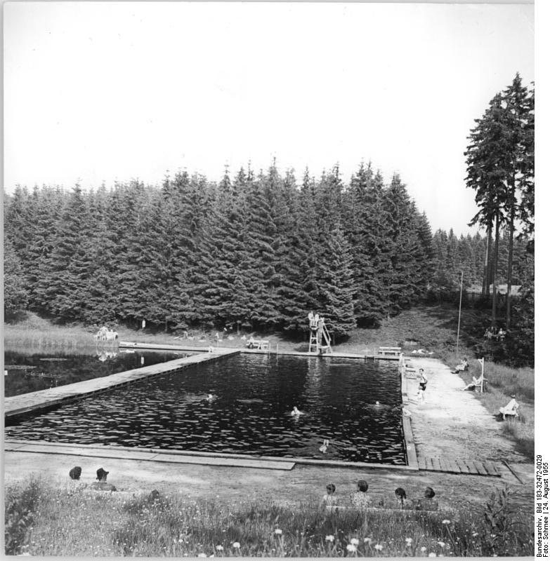 Zentralbild-Schmee Ro-Ho. 41 Motive 24.8.1955 Schöner deutscher Harz. Waldfreibad in Elend-Harz.